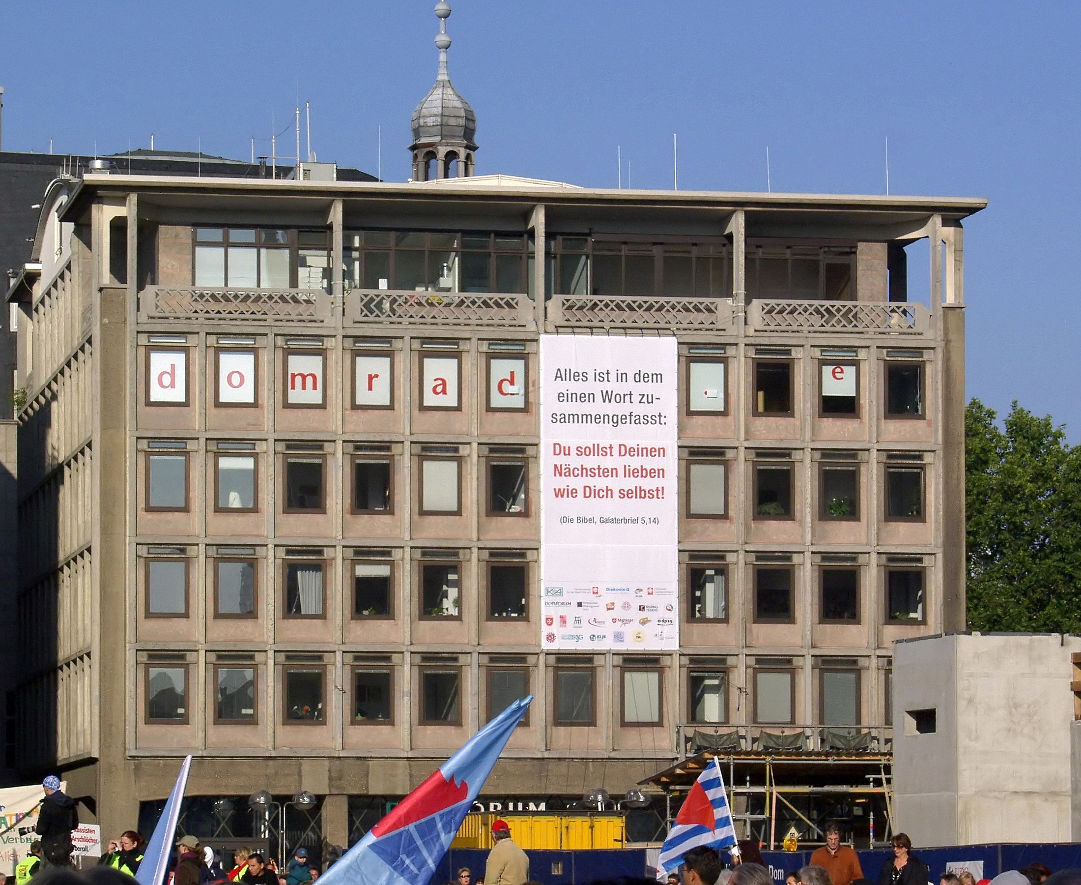 Gebäude des Domforums Köln, im 4. Stock sind die Senderäume des Domradios untergebracht. Banner an der Hauswand zum Thema Nächstenliebe: „Du sollst deinen Nächsten lieben wie dich selbst“ (Galaterbrief 5,14). Im Vordergrund Fahnen von Demonstranten der politischen Demonstration „Köln stellt sich quer“ gegen den so genannten „Anti-Islamisierungskongress“ der rechtsgerichteten Partei „Pro Köln“ auf dem Roncalliplatz in Köln. This is a photograph of an architectural monument.